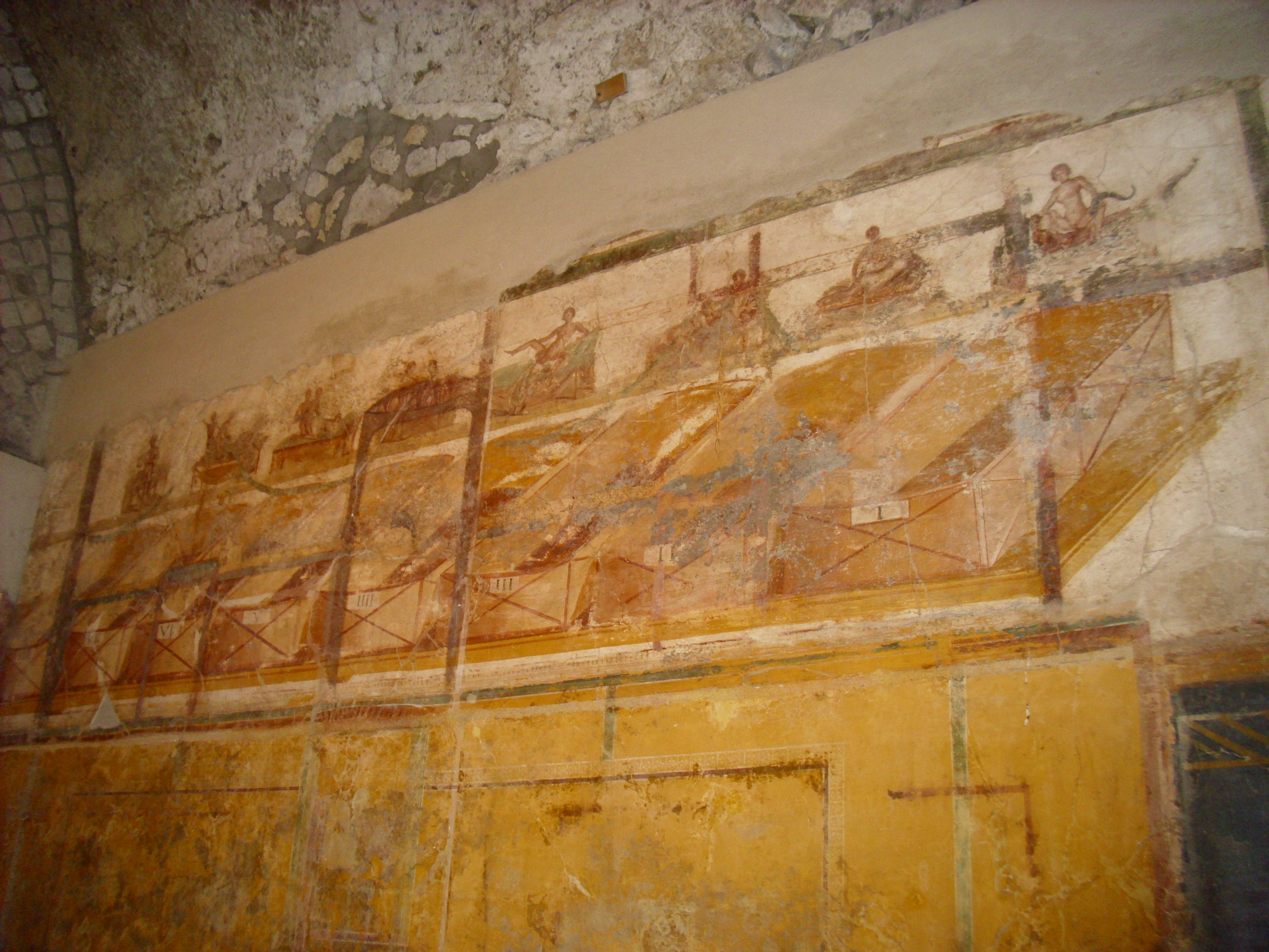 Pompeya. Apoditerium. Termas Suburbanas